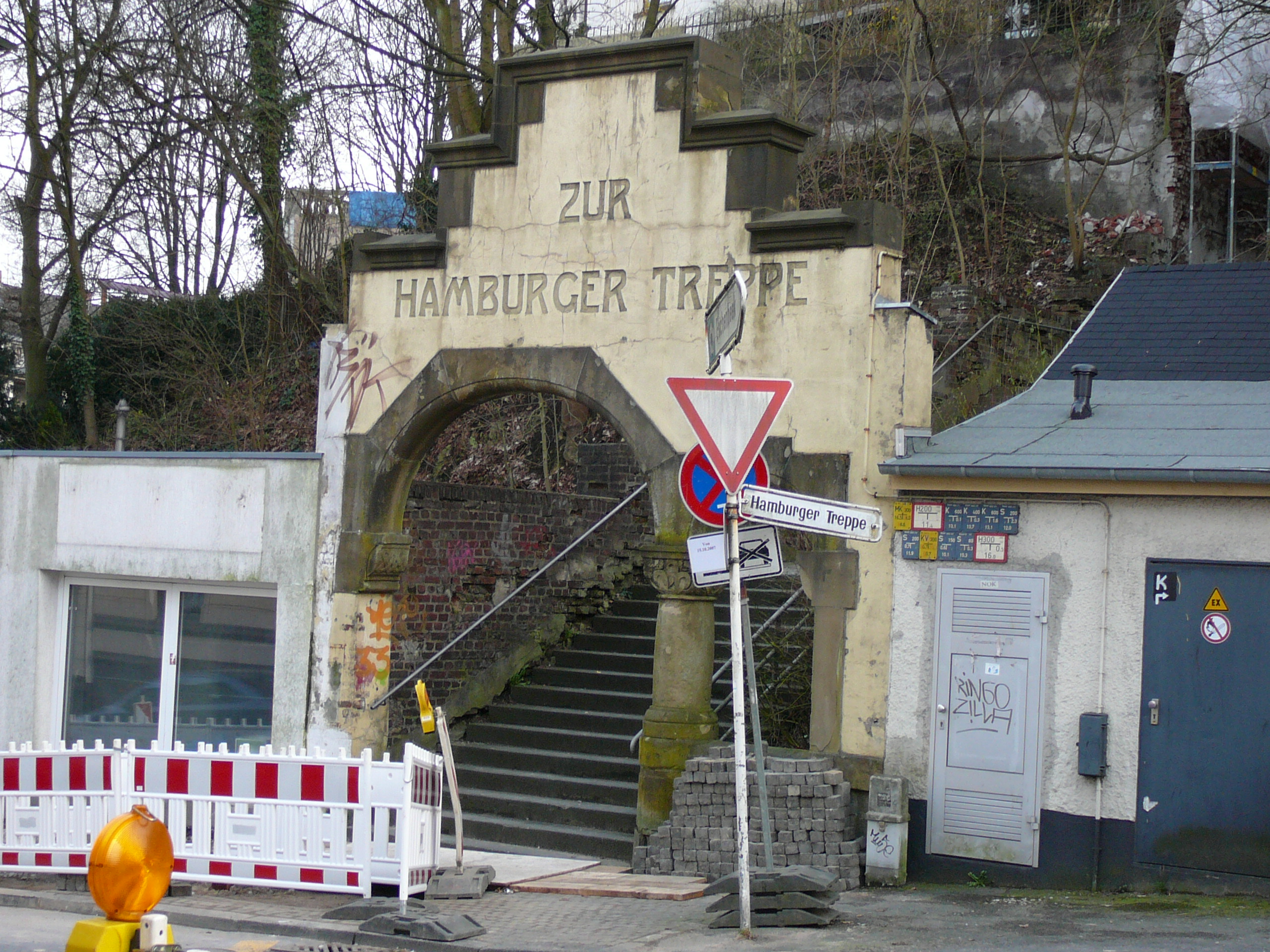 Hamburger Treppe, Wuppertal